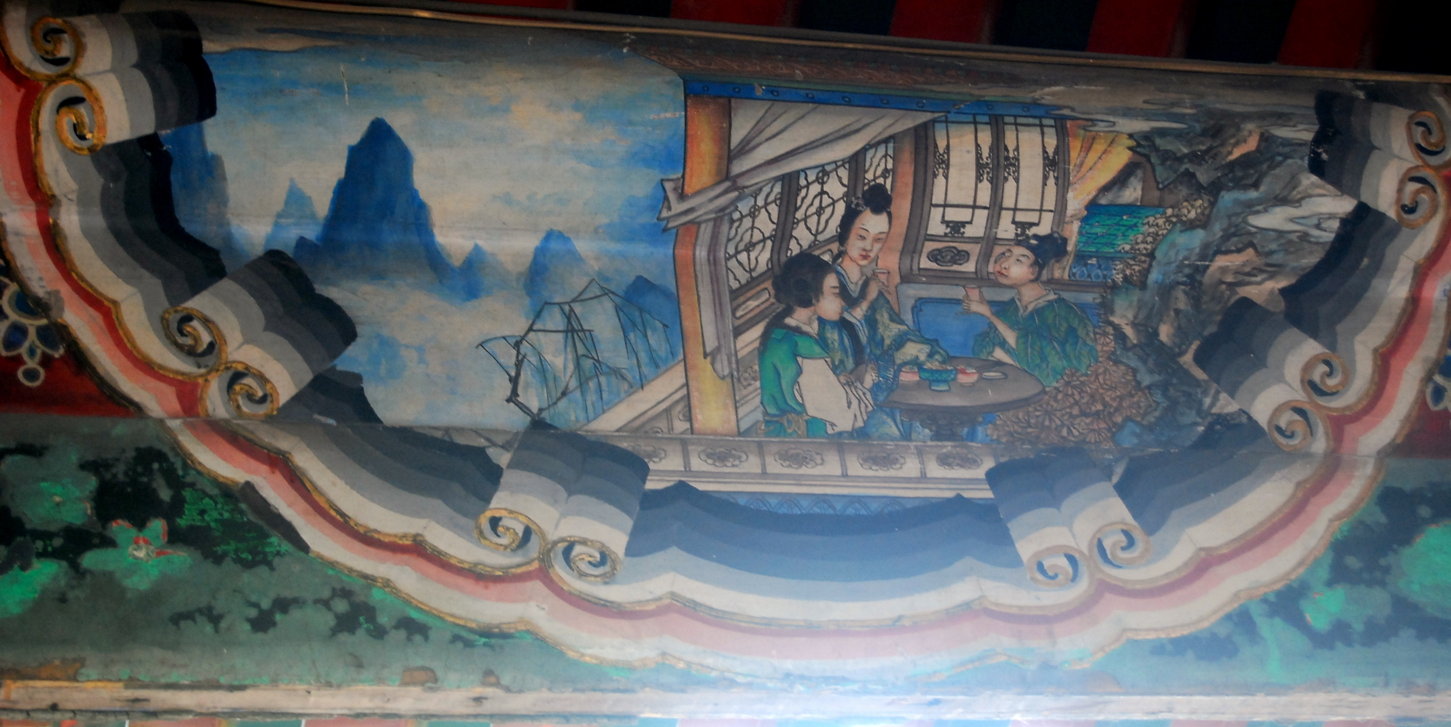 颐和园长廊上的彩绘：蒲松龄聊斋志异中的翩翩的故事。描述穿着叶子做的衣服的罗子浮与翩翩和花城娘子喝酒时的情景